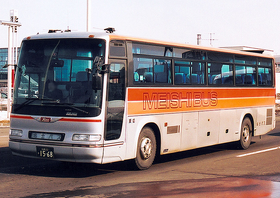 名士バス 日野・セレガFD